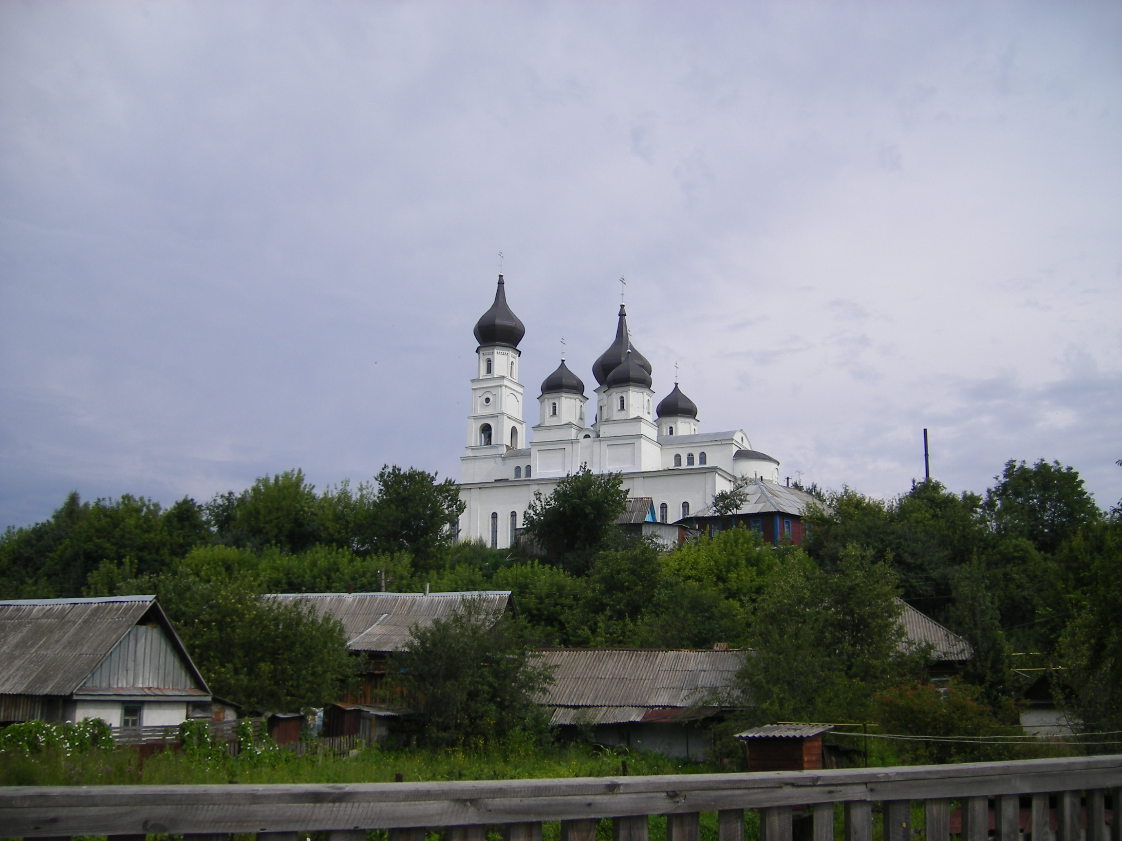 Ovruch (Zhytomyr Oblast)